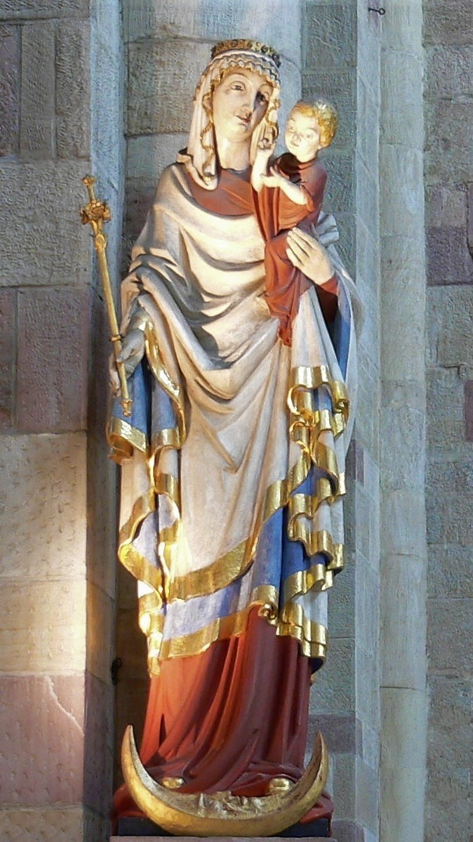 Speyerer Madonna , als Stiftung Papst Pius XI zur 900 - Jahrfeier des Speyerer Domes anstelle des 1792 zerstörten Gnadenbildes am 6. Juli 1930 im Dom aufgestellt. Künstler Professor August Weckbecker